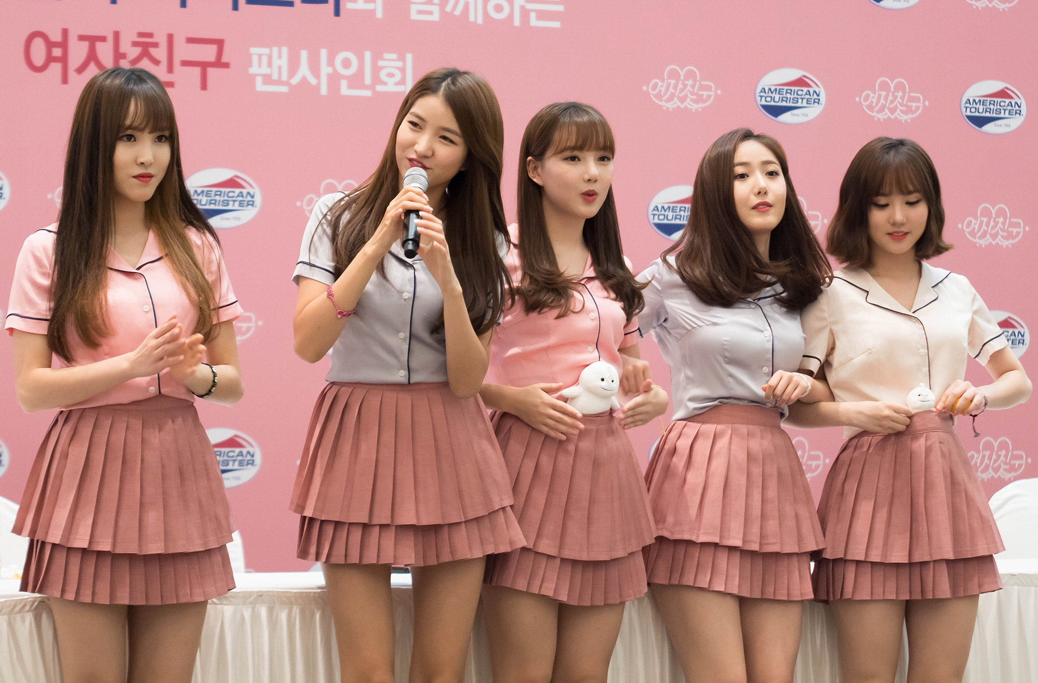 161028 여자친구 하남 팬싸